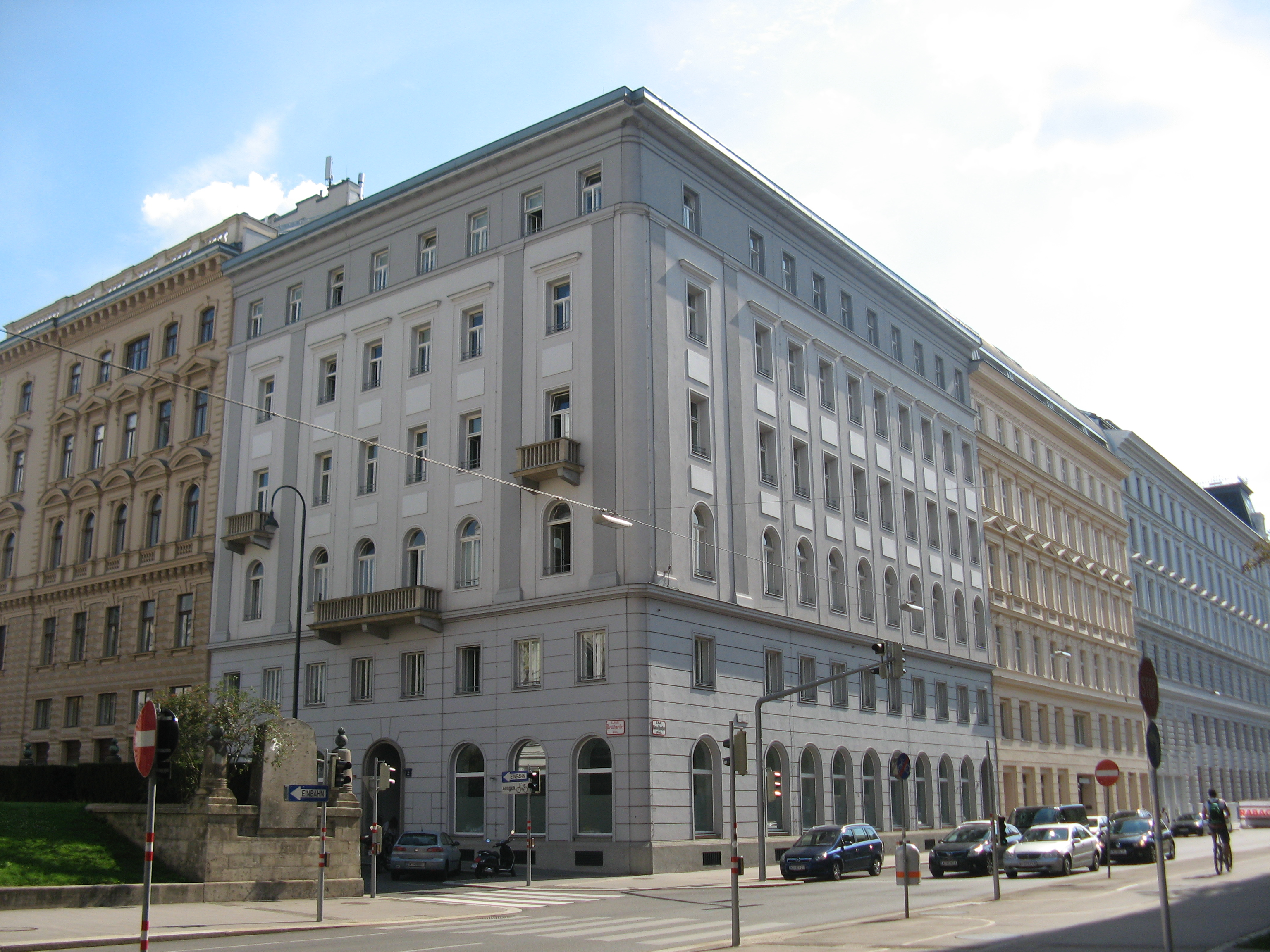 Deutschmeisterplatz 2 (1880) von Dionys Milch, Wien-Innere Stadt